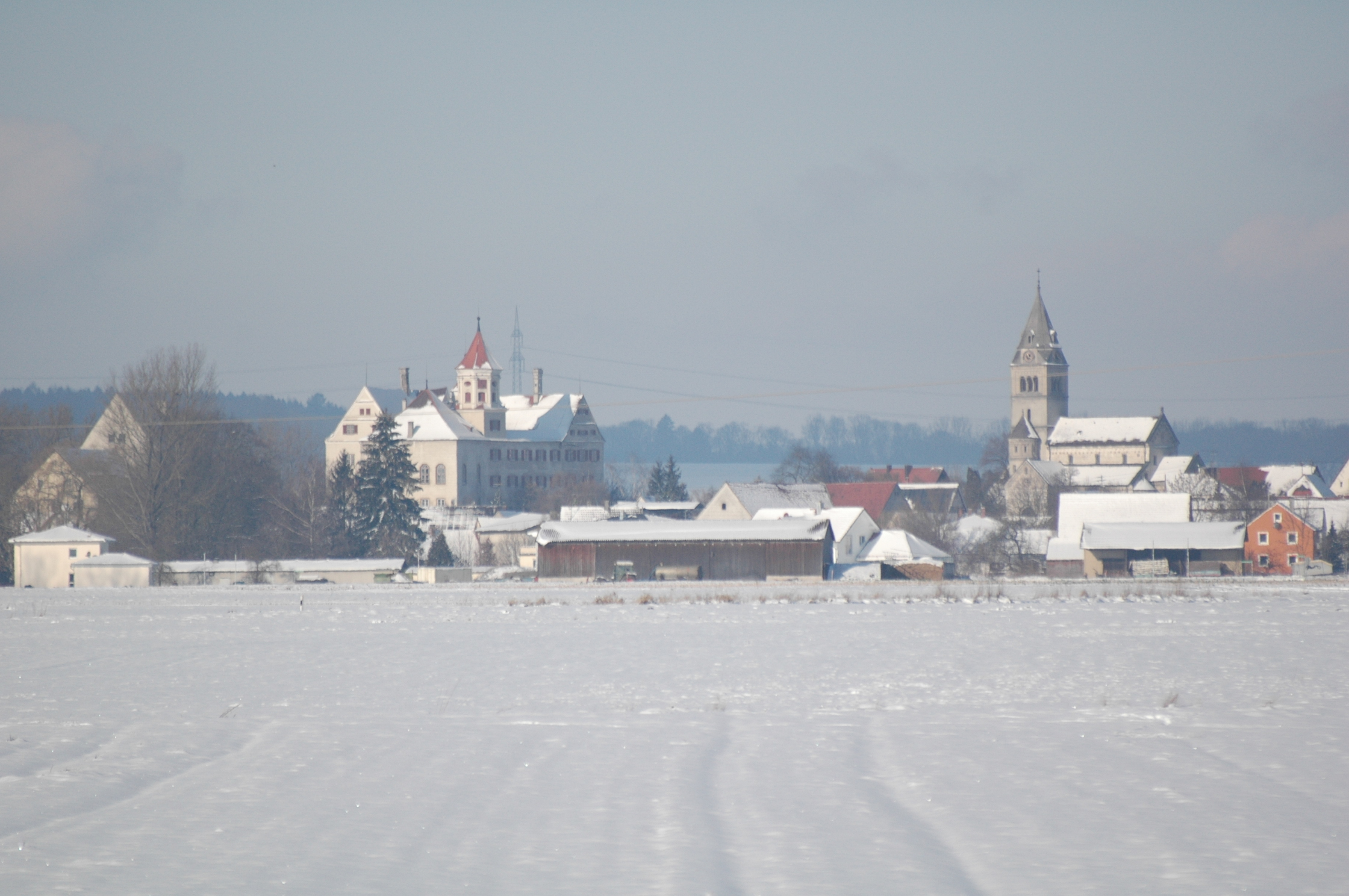 Brenz von Südost. Fotografie, aufgenommen von Johannes Bae., 2007.